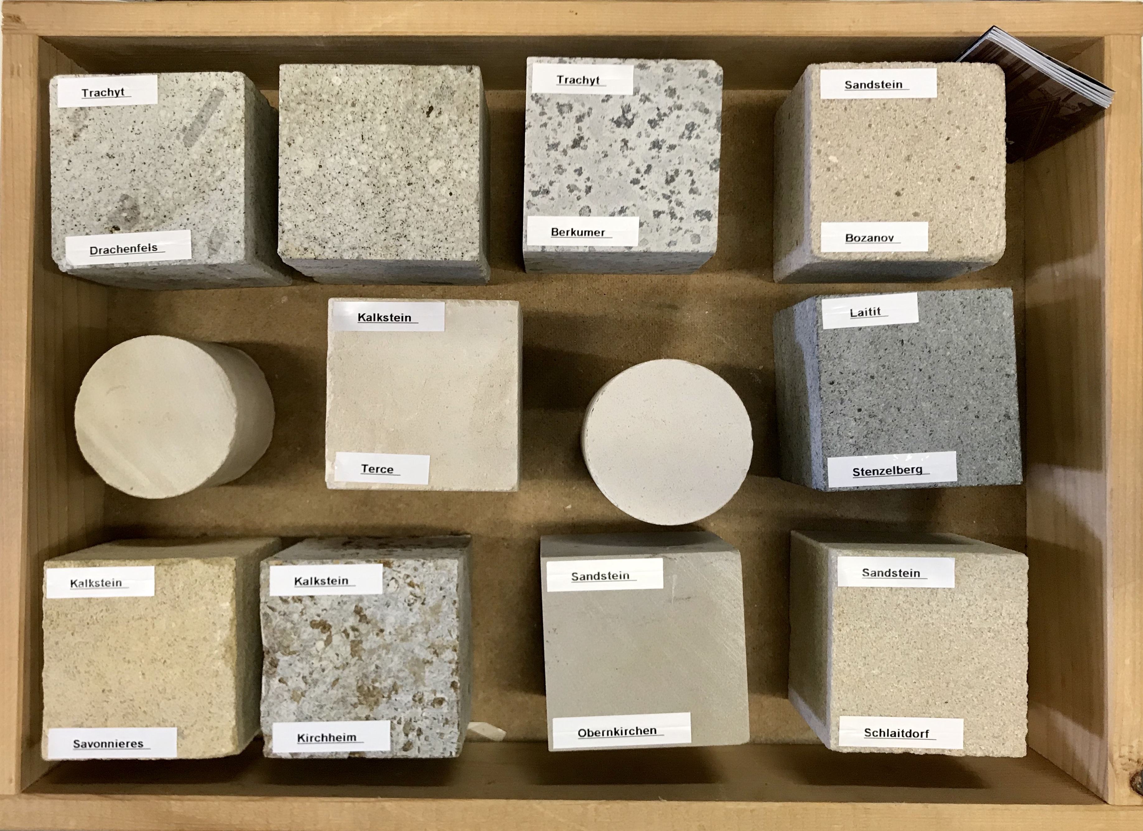 Am Kölner Dom wurden rund 50 verschiedene Gesteinsarten verwendet. Die acht wichtigsten davon sind: Trachyt vom Drachenfels, Stenzelberger Trachyt, Schlaitdorfer Sandstein, Obernkirchener Sandstein, Muschelkalk vom Main, Basaltlava aus der Eifel, Londorfer Basaltlava, Weiche Kalksteine (aus Savonniere, Caen)